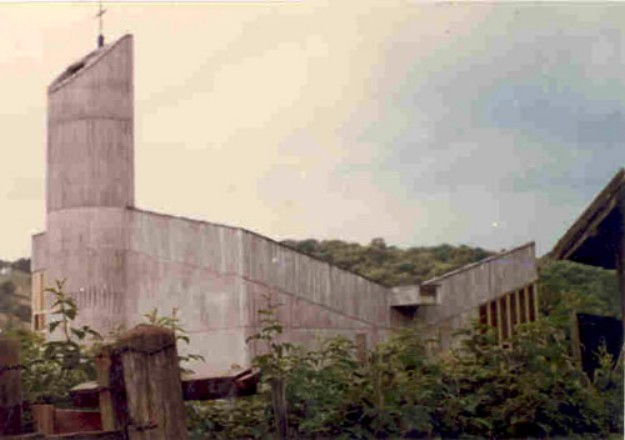 Nemeshetési római katolikus templom, 1976